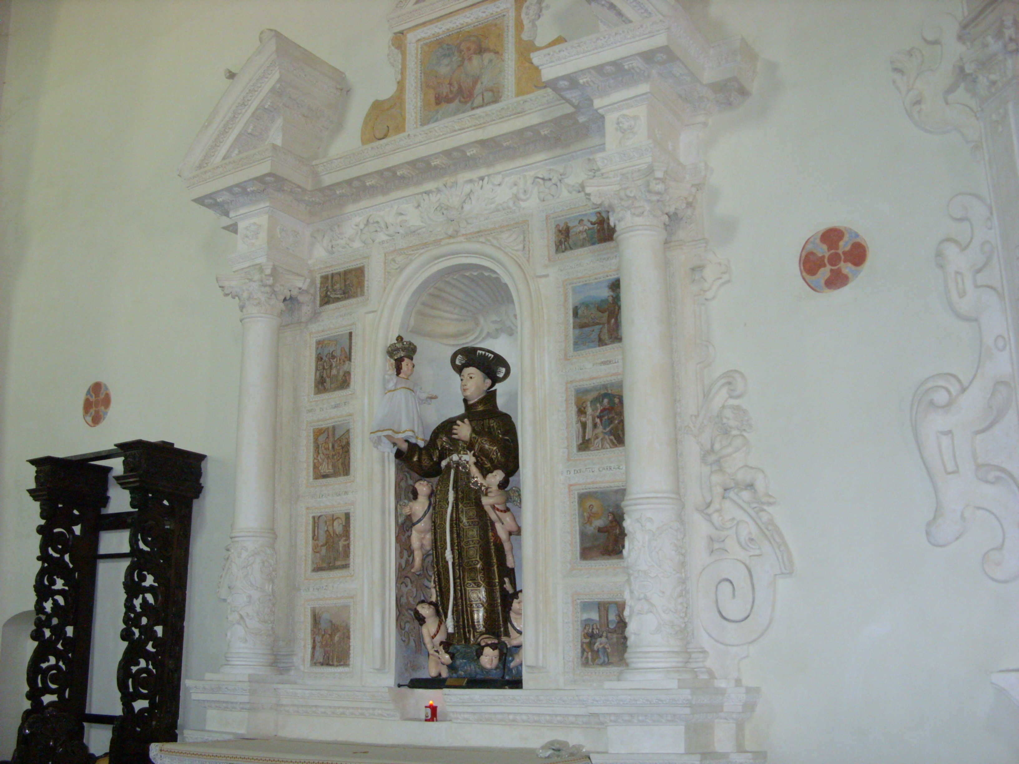 Altare con la statua di Sant' Antonio da Padova nella chiesa della Pietà a Teggiano (SA).